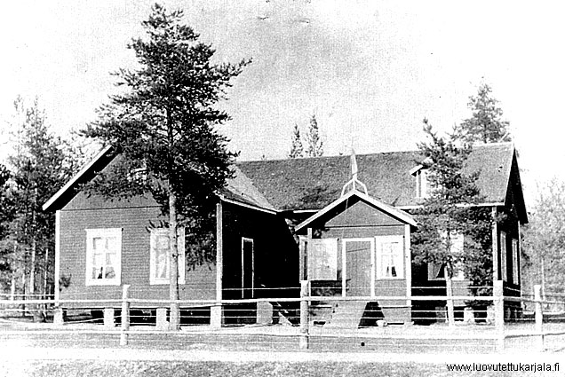 Vuotjärven Nuorisoseurantalo Muolaan Soittolan kylässä.